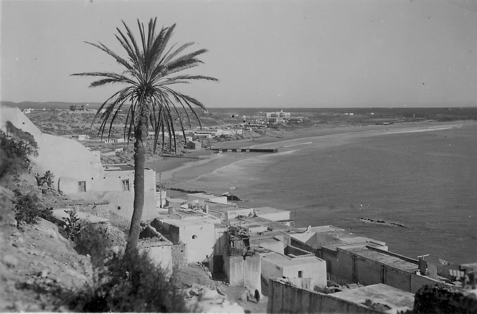 Agadir, Maroc - le quartier de Founti et la plage.